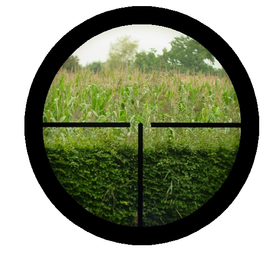 Absehen Nummer 1 für Zielfernrohre